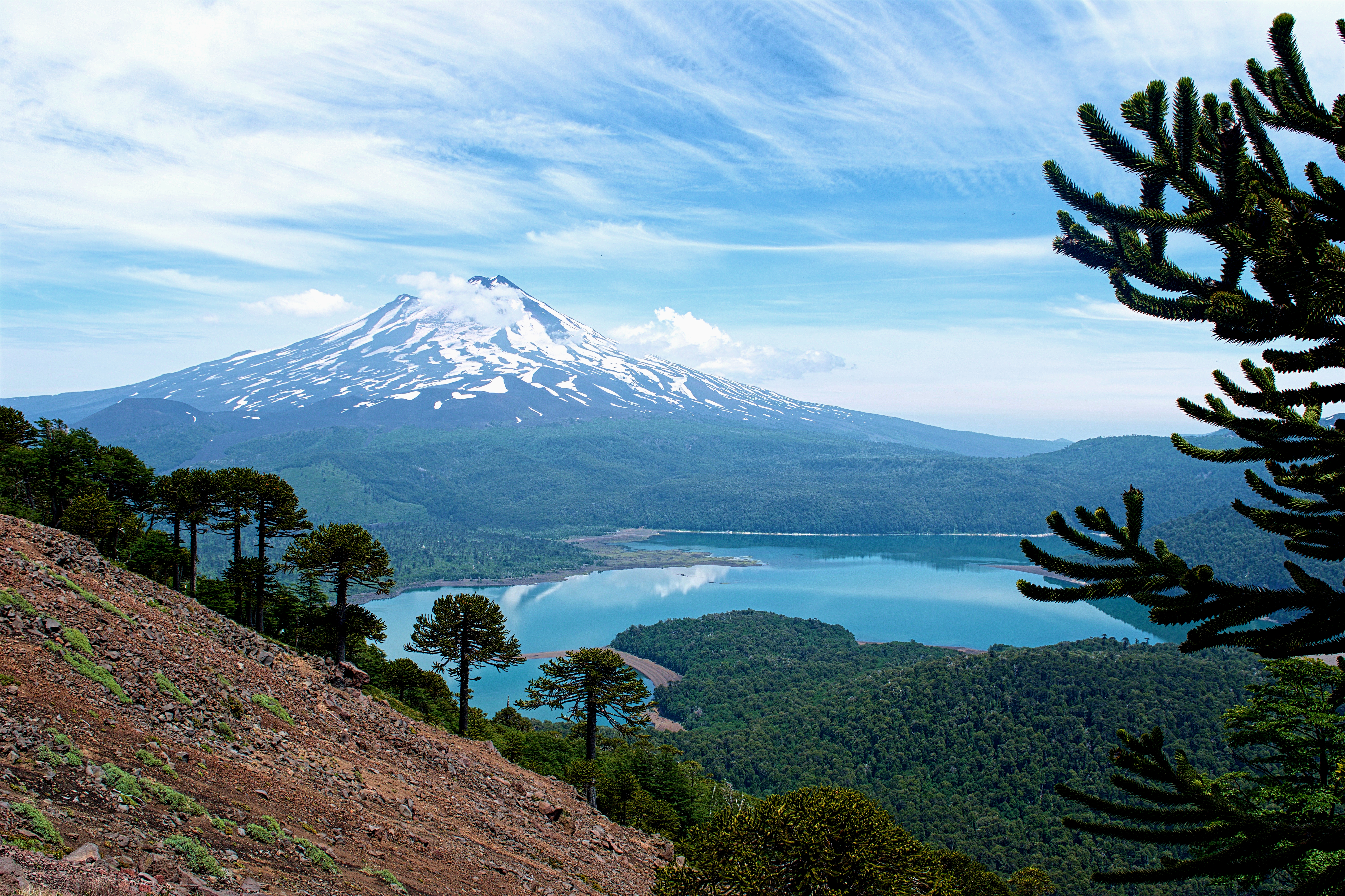 Volcán Llaima, araucarias y lago Conguillio, sendero Sierra Nevada, Parque Nacional Conguillio